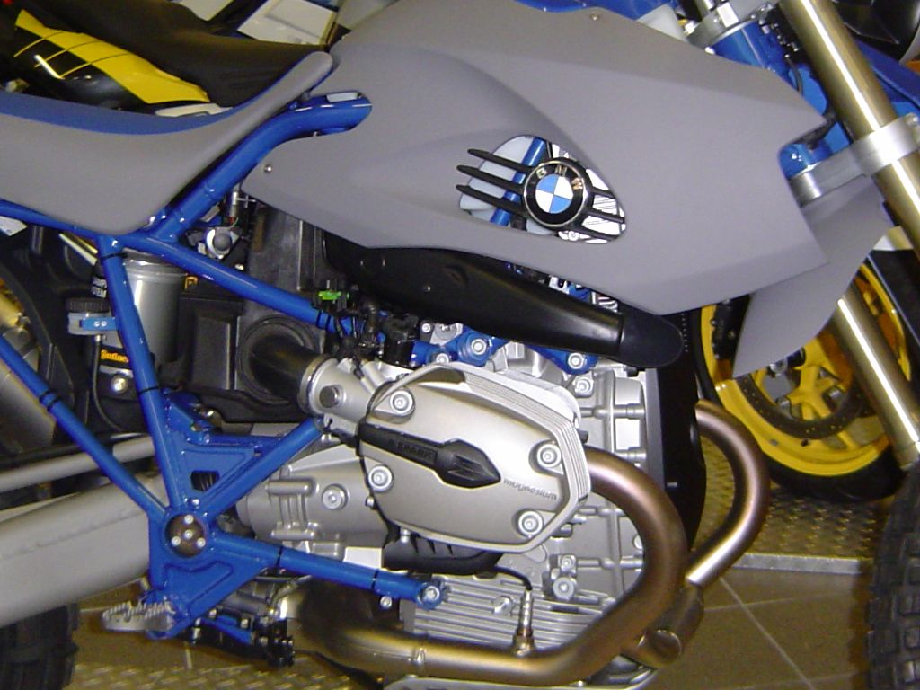 BMW motorcycle Engine HP 2